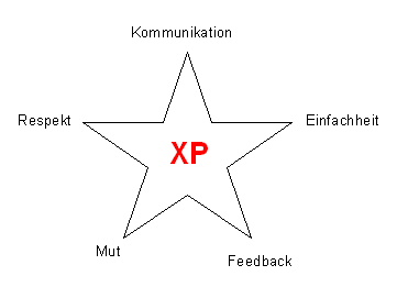 Xp-Werte